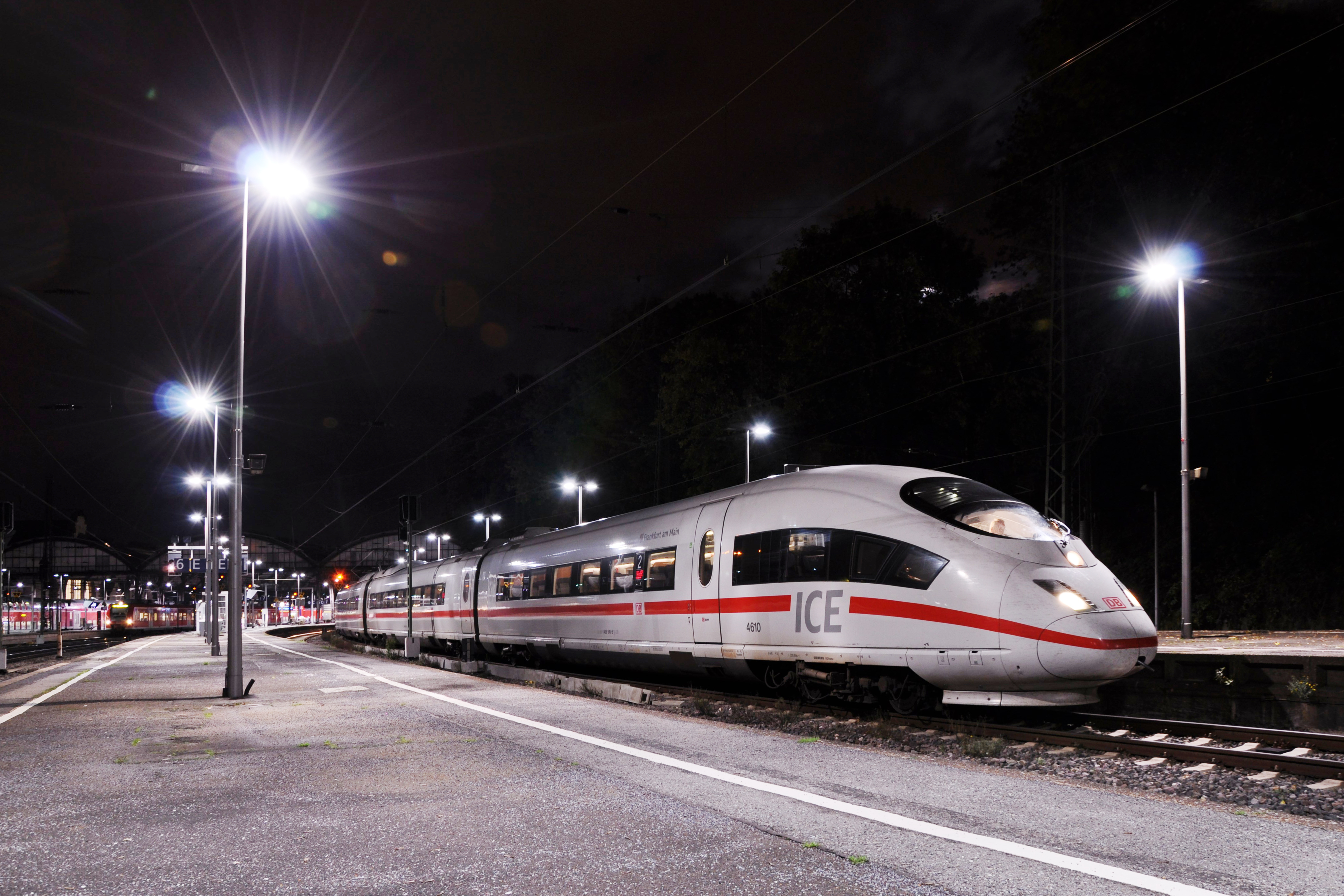 ICE International in Aachen Hauptbahnhof im Jahr 2013.